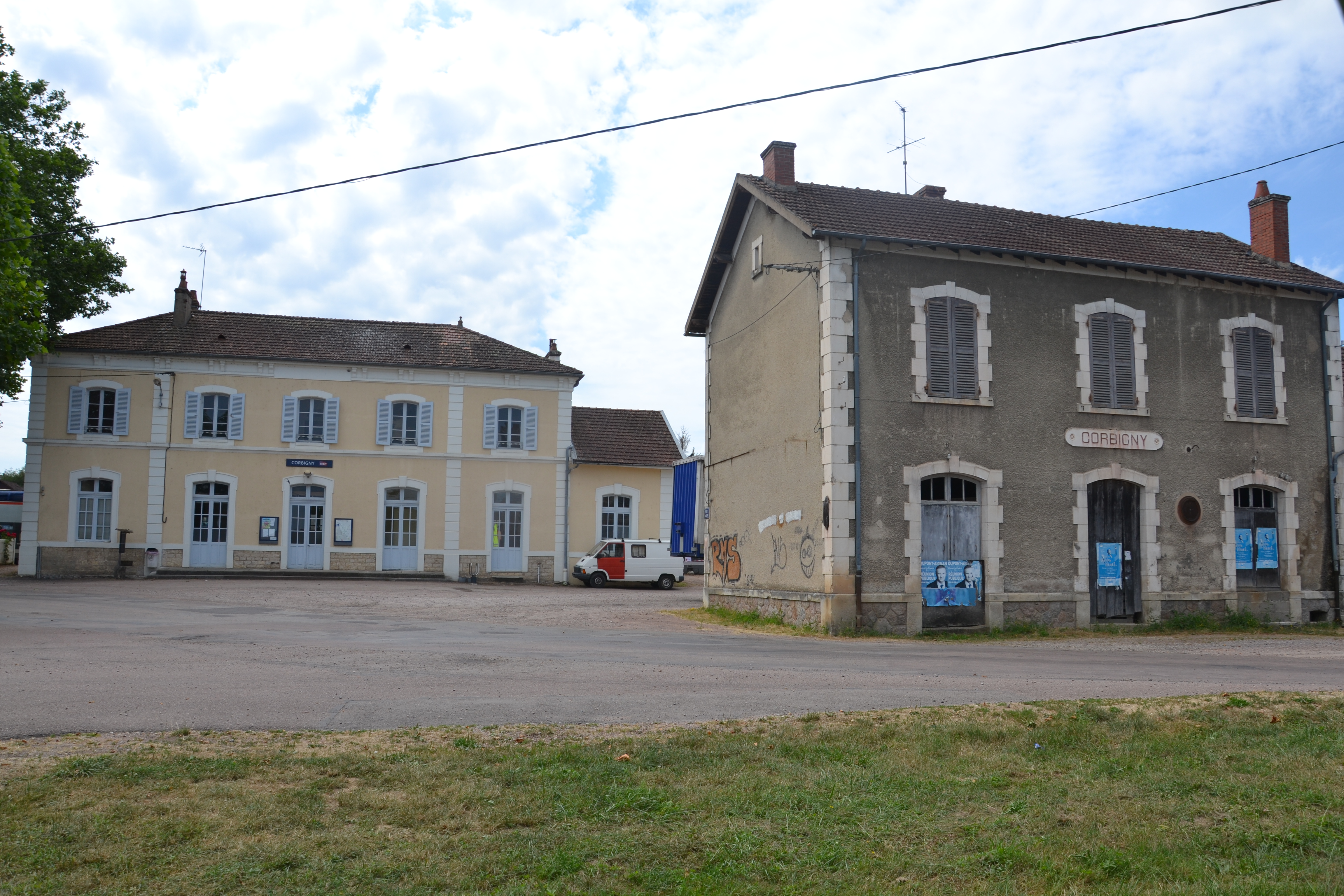 Bâtiment des deux lignes (national et départementale)